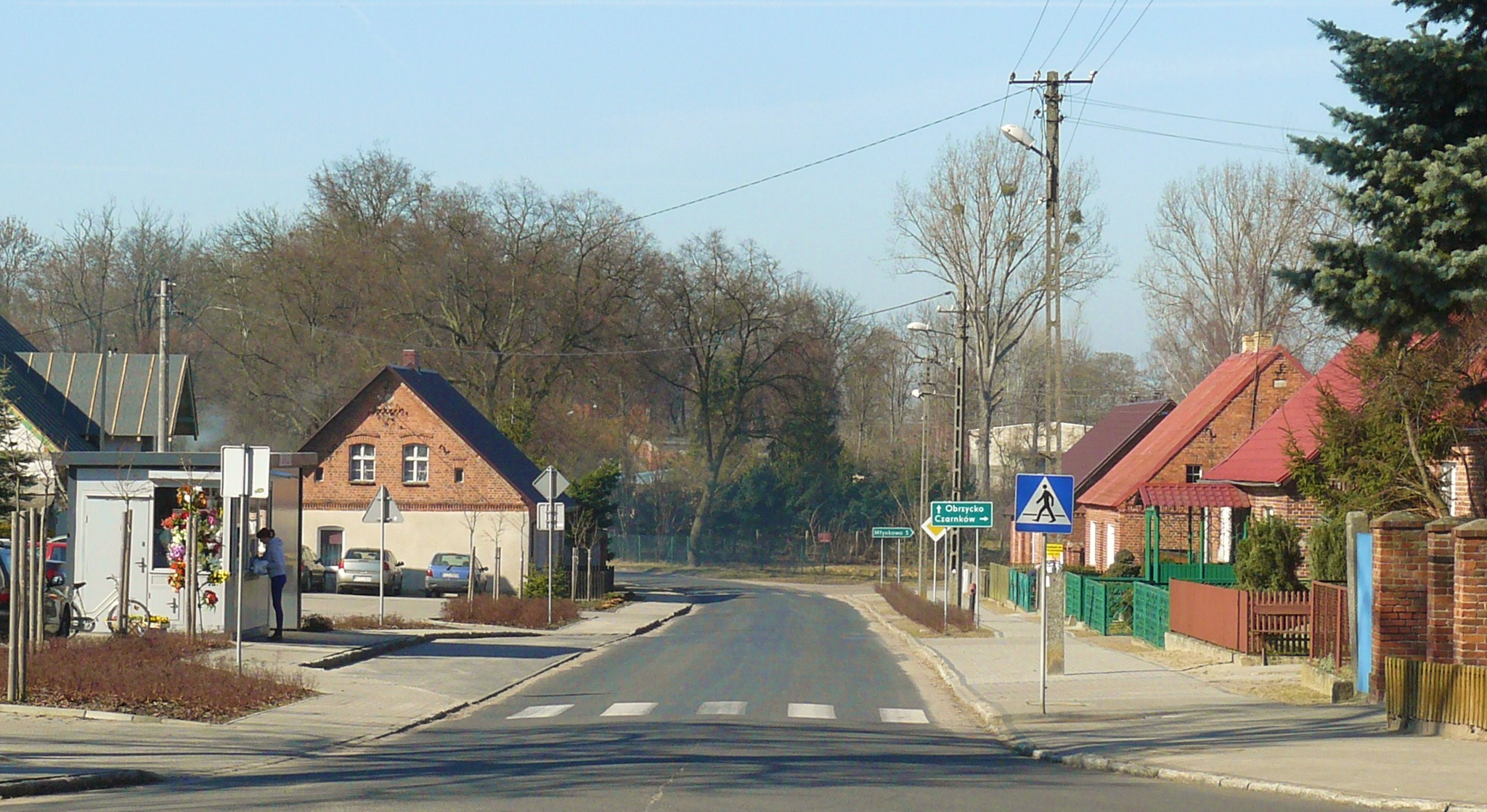 Boruszyn, gm. Połajewo.